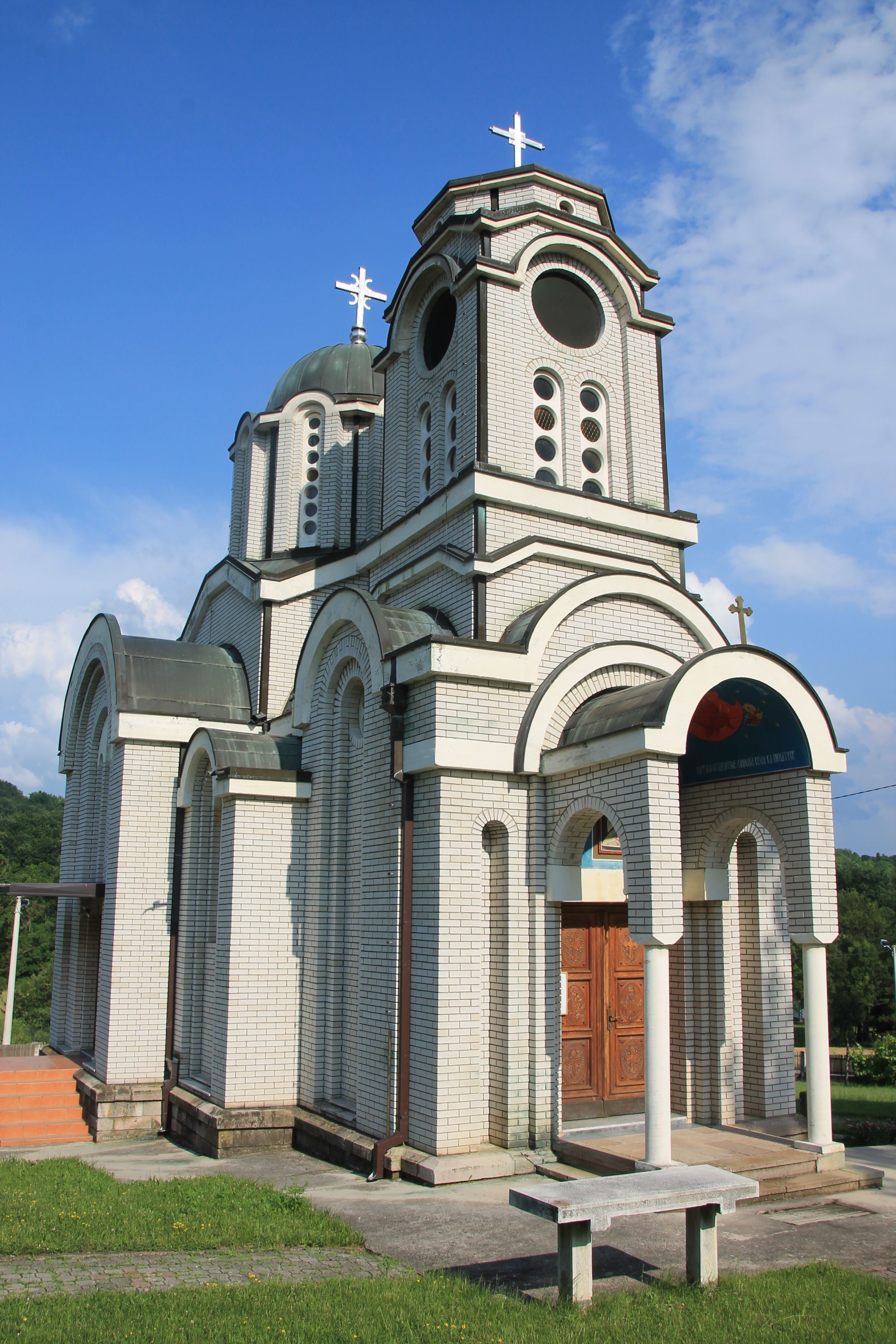 Crkva Sv. proroka Ilije (Donja Trepča)